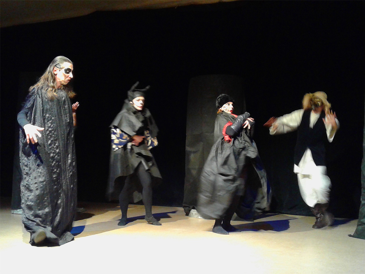 Фрагмент вистави-містерії "Слово про збурення пекла"